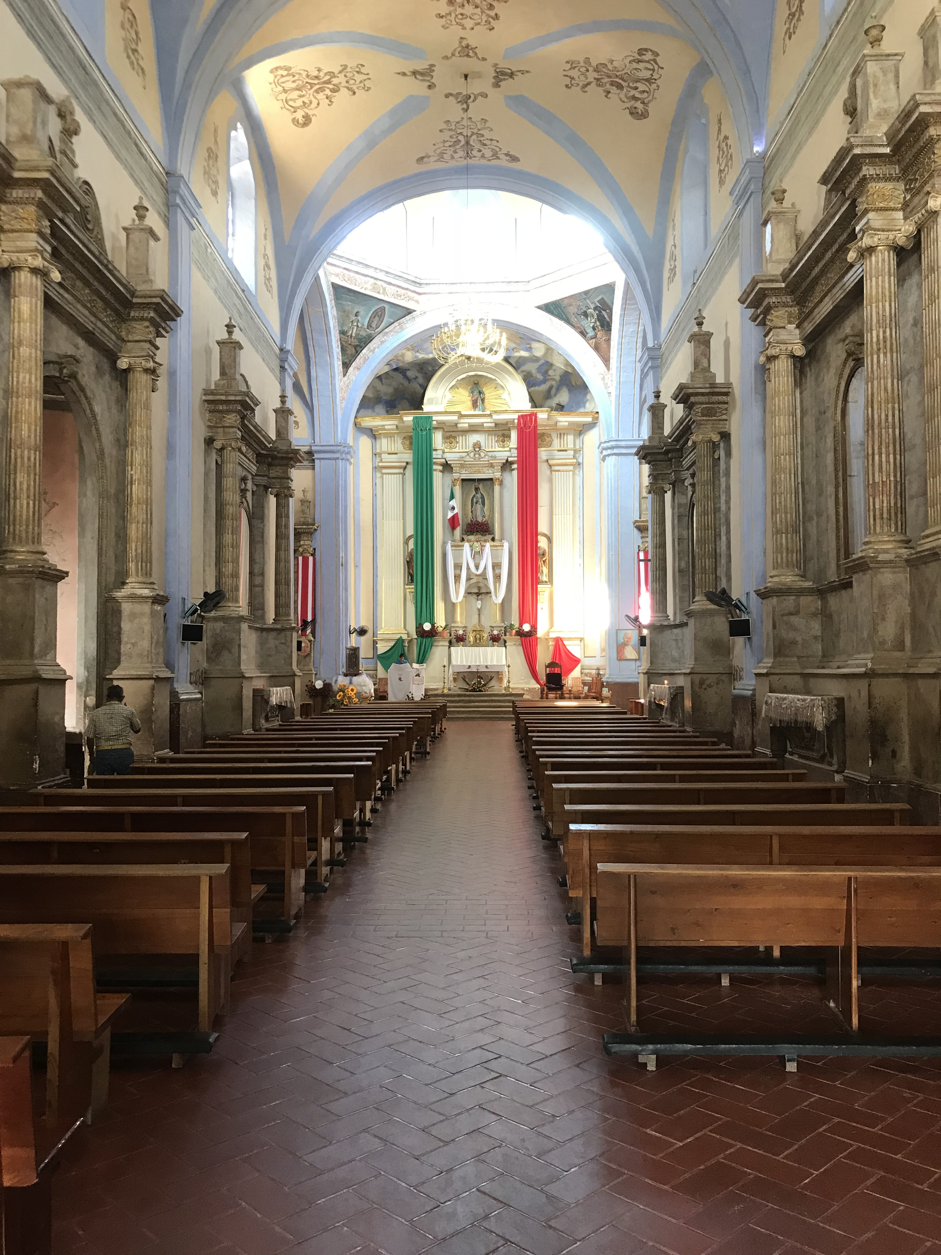 Interior de la Mision Santiago Apostol, vista frontal de la entrada.